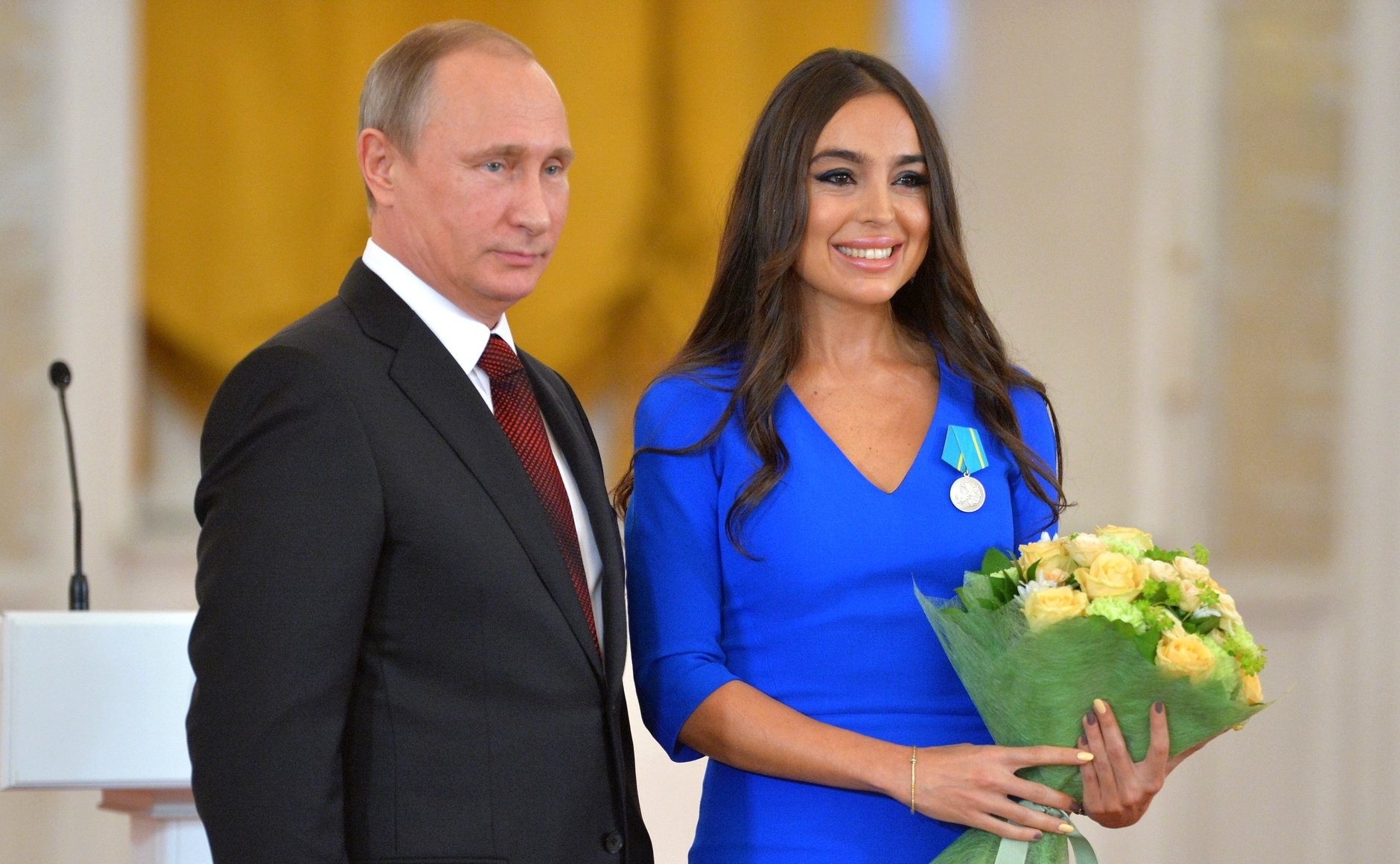 Церемония вручения государственных наград России иностранным гражданам. Медалью Пушкина награждена вице-президент Фонда Гейдара Алиева, глава представительства Фонда Гейдара Алиева в Российской Федерации Лейла Алиева